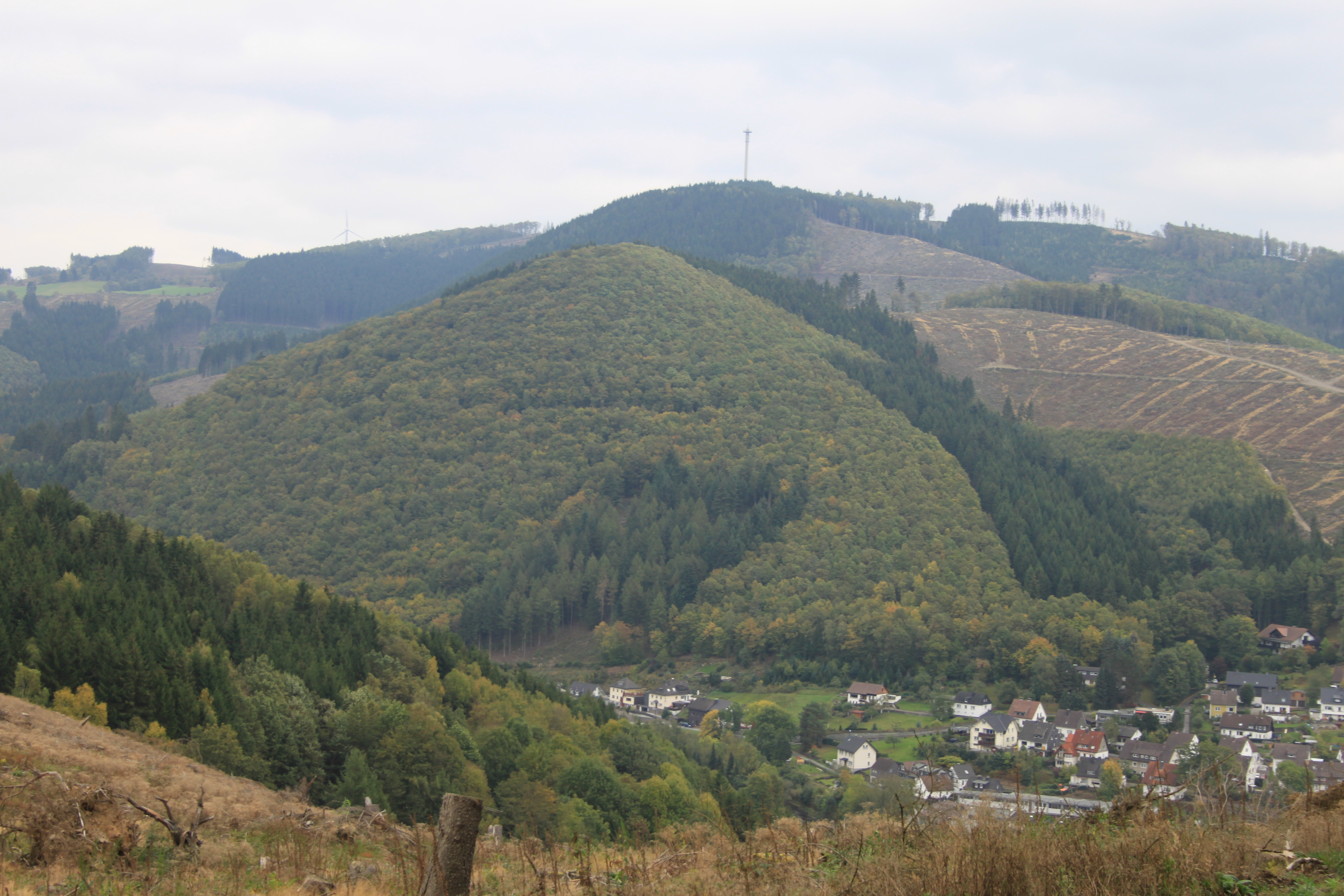 Wallanlage Kahle in Lennestadt-Meggen